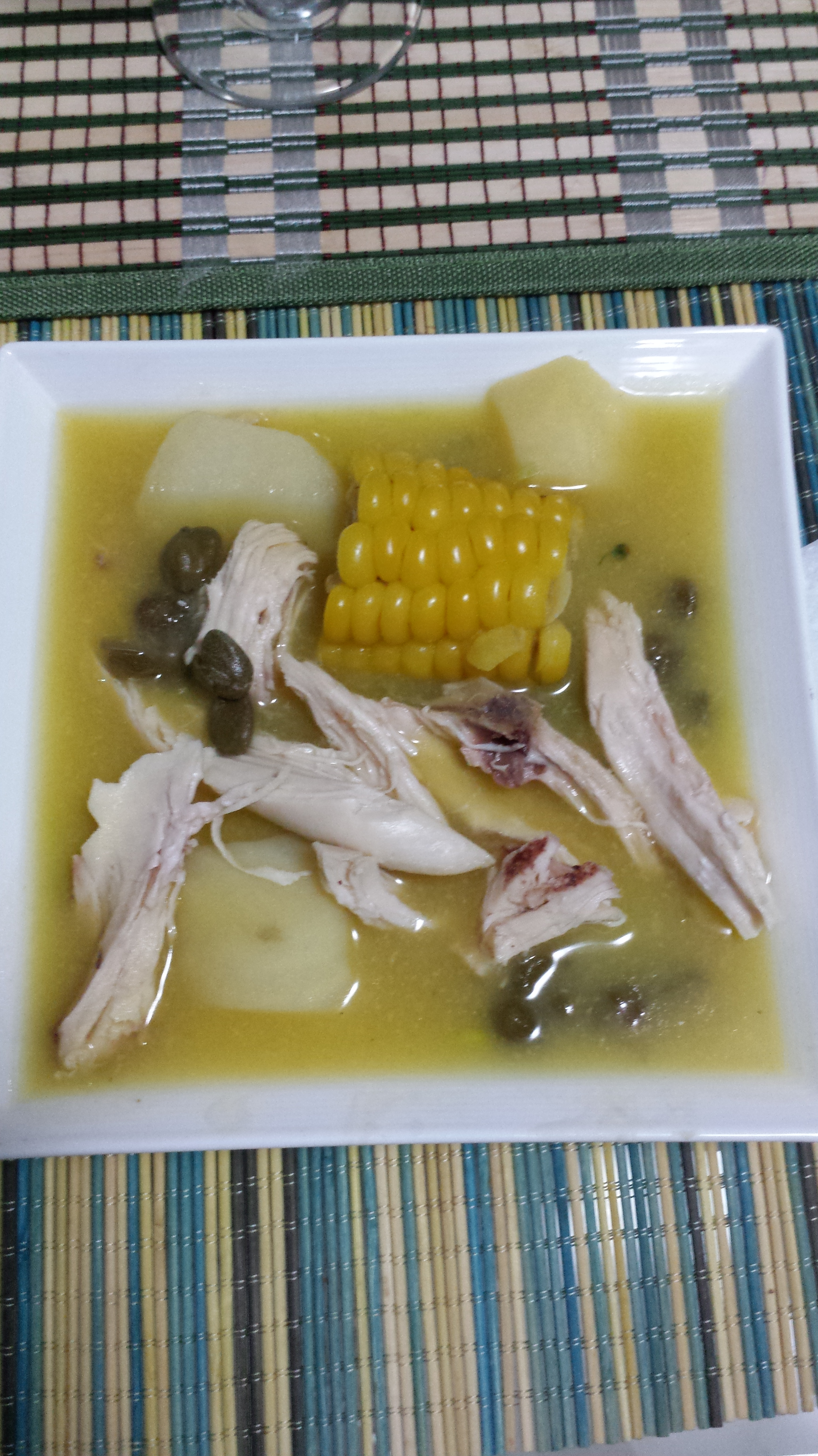 Ajiaco plato andino, Bogotá, Colombia.